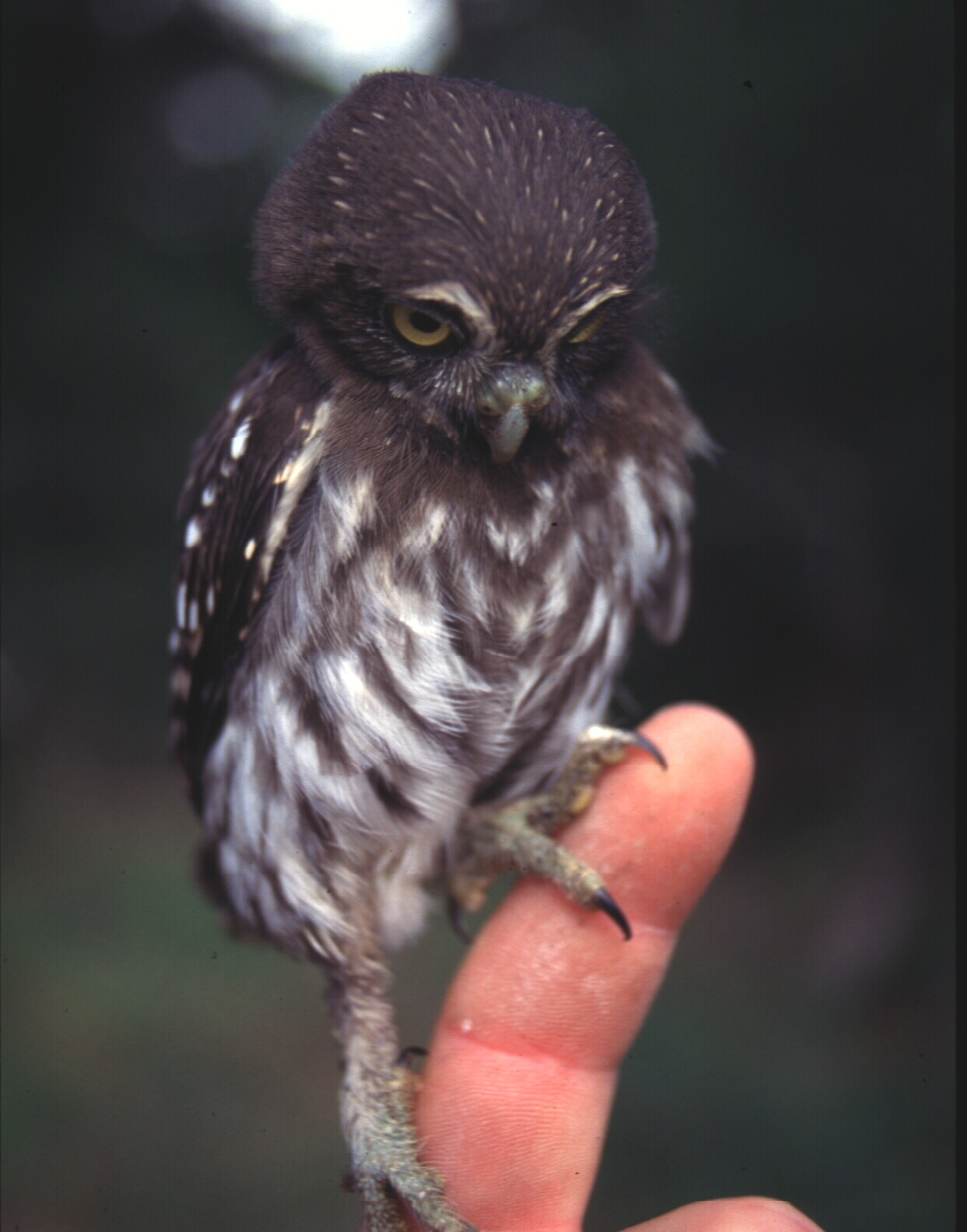 Ferruginous pygmy owl (Glaucidium brasilianum)